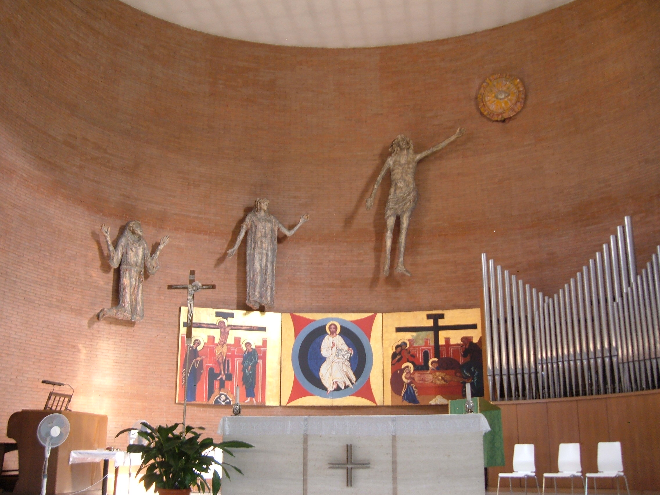 Chiesa parrocchiale di Sant'Achille, a Roma, nel quartiere Monte Sacro Alto, in via Giovanni Verga.